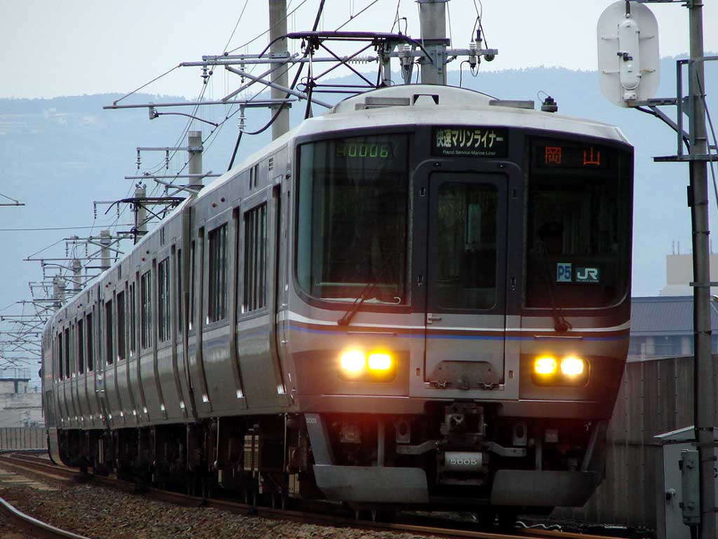 JR西日本 223系5000番台